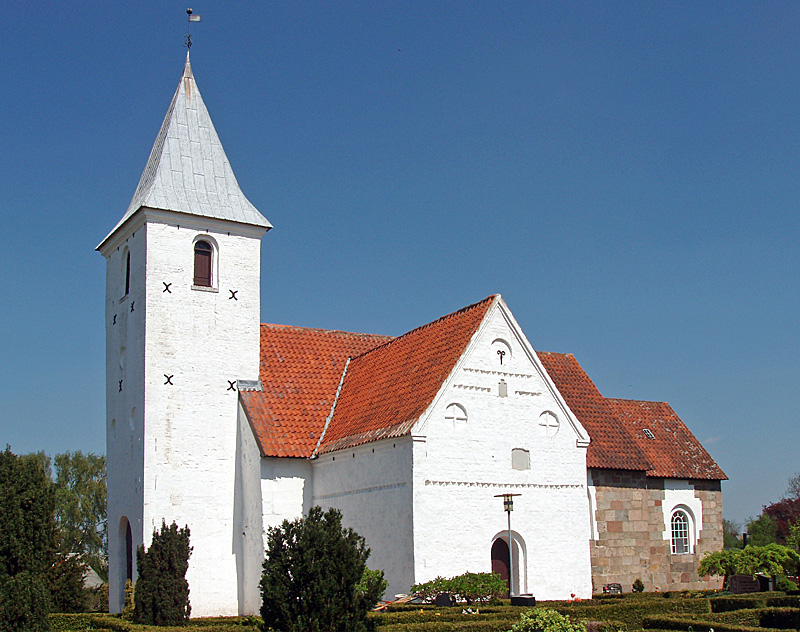 Borum Kirke er en landsbykirke i den destlige del af Århus Kommune, Framlev Herred, Århus Amt, Denmark.